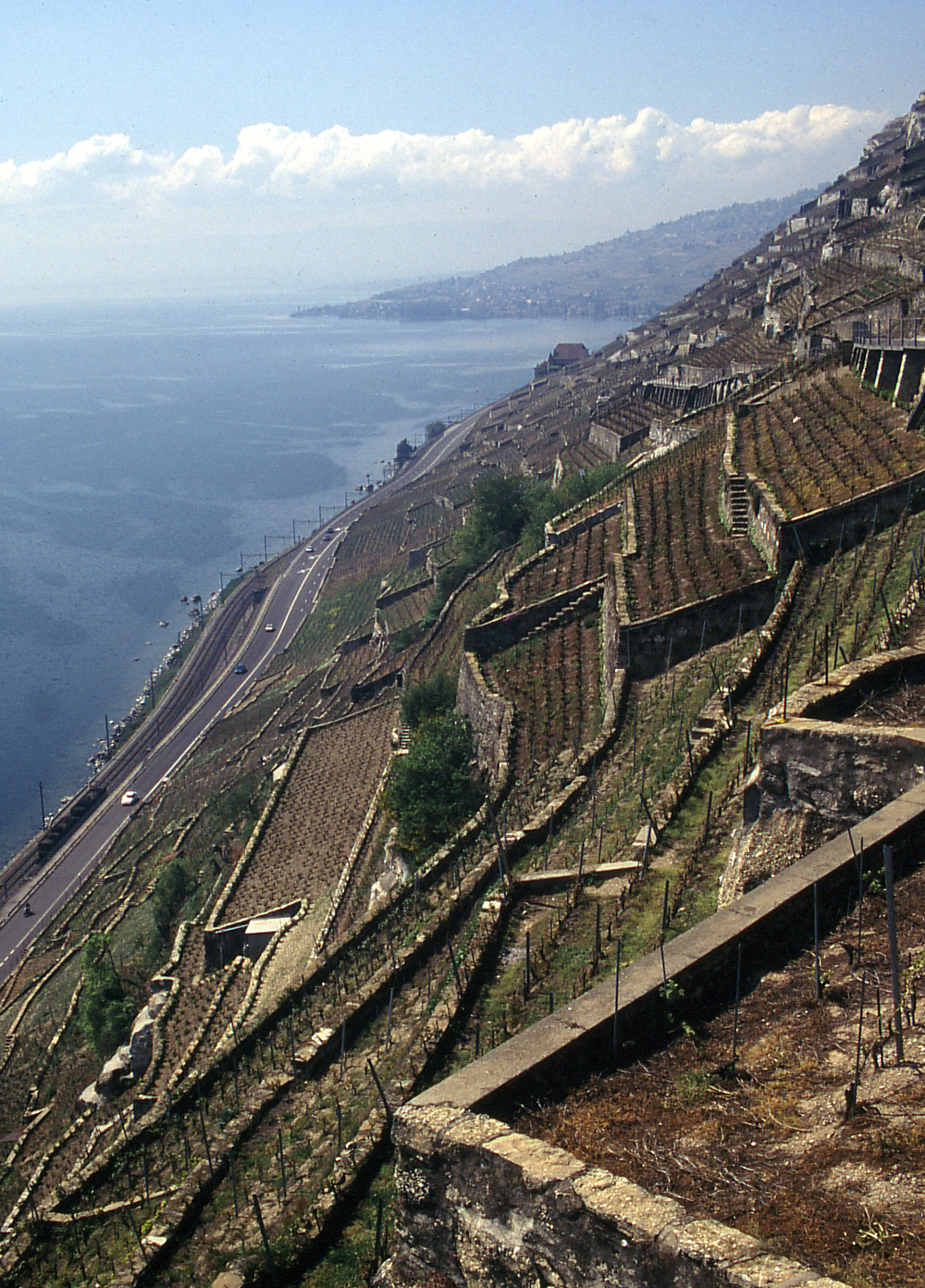 Weinberge im Lavaux und Genfersee